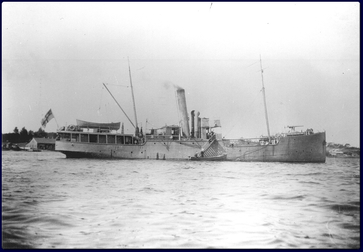 Canadian navy patrol vessel HMCS Lauretian.